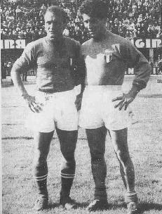 Omar Sivori (a destra) e Giacomo Losi